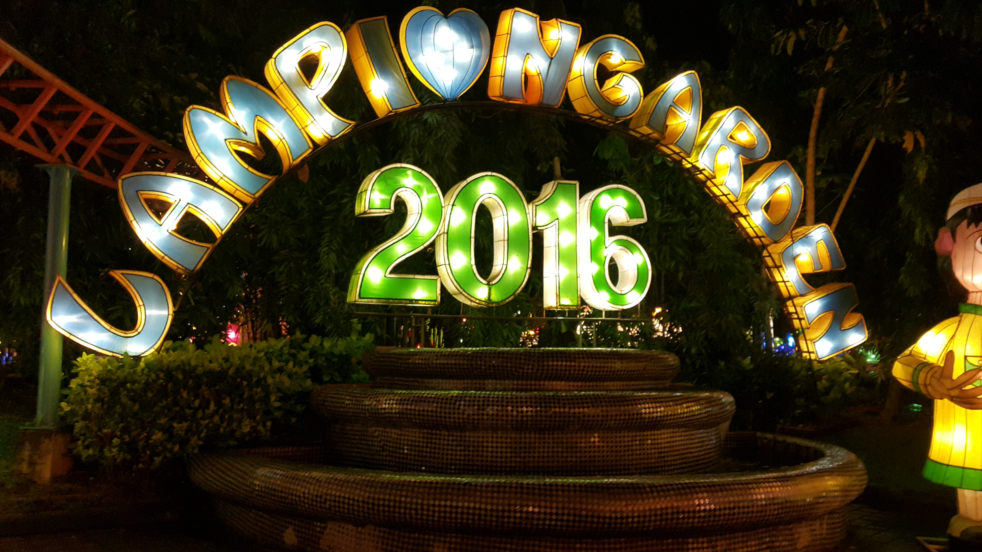 Lampion Garden BNS